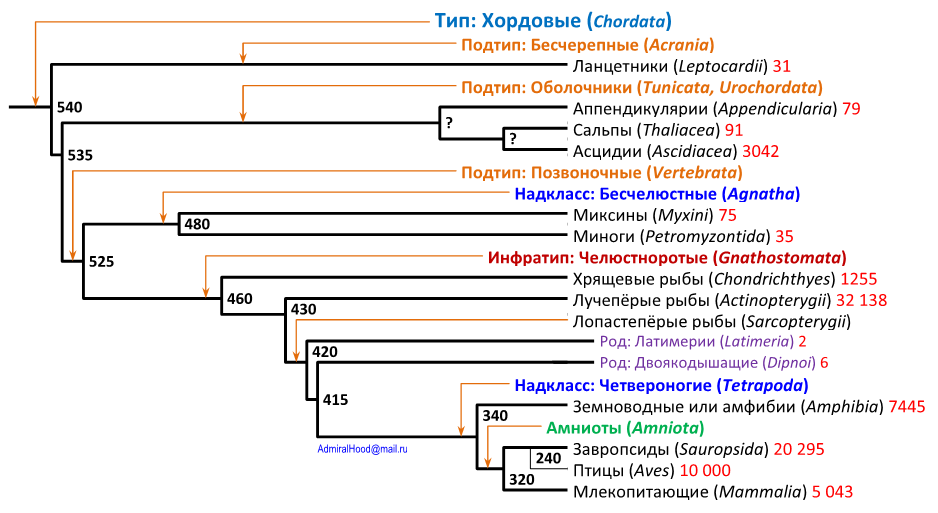 Филогенетическое дерево современных классов хордовых. Классы обозначены чёрным цветом. Цифры в узлах дерева показывают ориентировочное время расхождения филогенетических групп (млн лет) по данным молекулярной филогенетики. Цифры после названий классов обозначают число известных видов. Все данные по на 08.09.2017